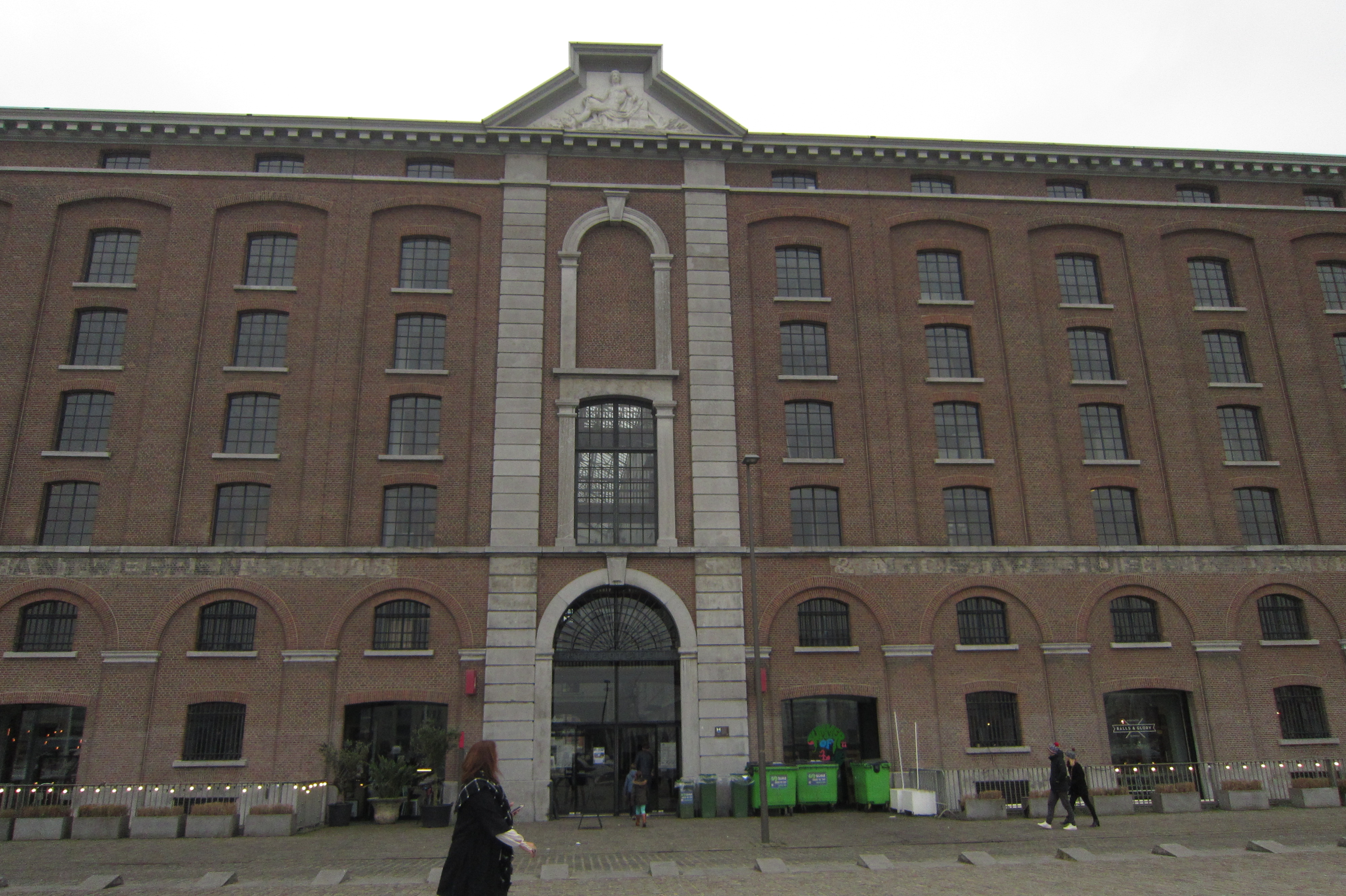 Voorgevel Stapelhuis Sint-Felix, Godefriduskaai, Antwerpen-stad